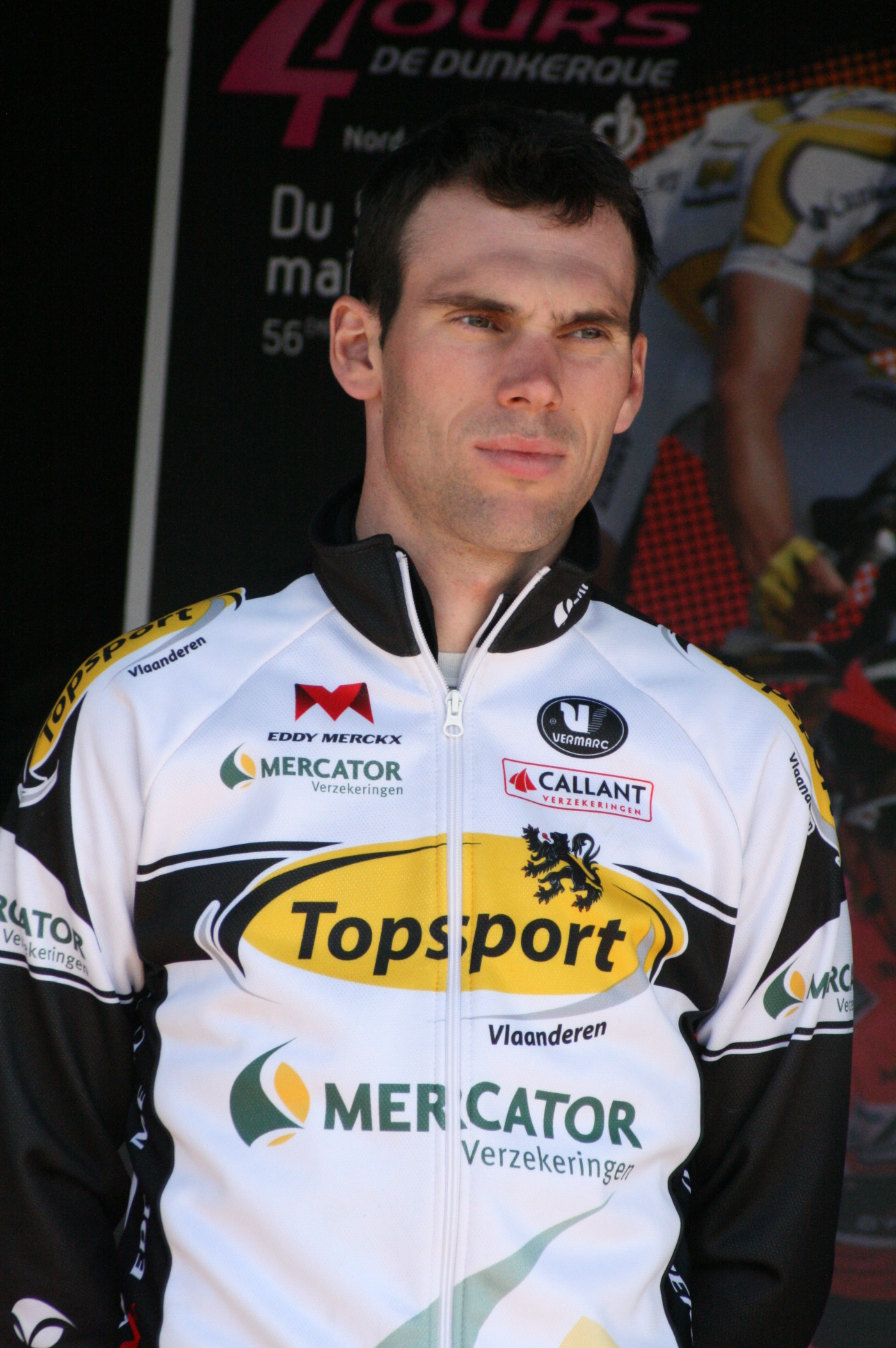 Stijn Neirynck, lors de la présentation des équipes des 4 jours de Dunkerque 2010